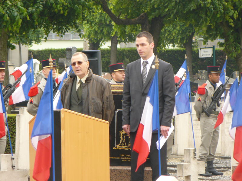 Inauguration de la kouba (reconstruite) de Nogent-sur-Marne, Daniel Lefeuvre, 28 avril 2011